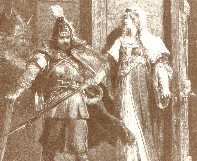 Беларуская (тарашкевіца): Вялікі князь Трайдзень (Trajdzień). Сустрэча з будучай жонкай, мазавецкай князёўнай Ганнай